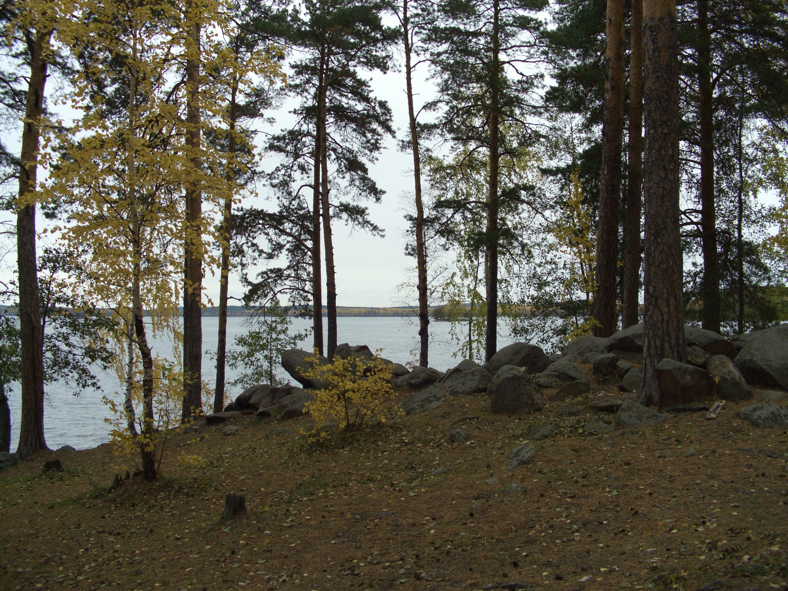 Берег озера Кисегач